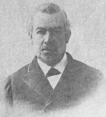 Santos Toruño, director del Instituto Nacional Central para Varones, en 1895.